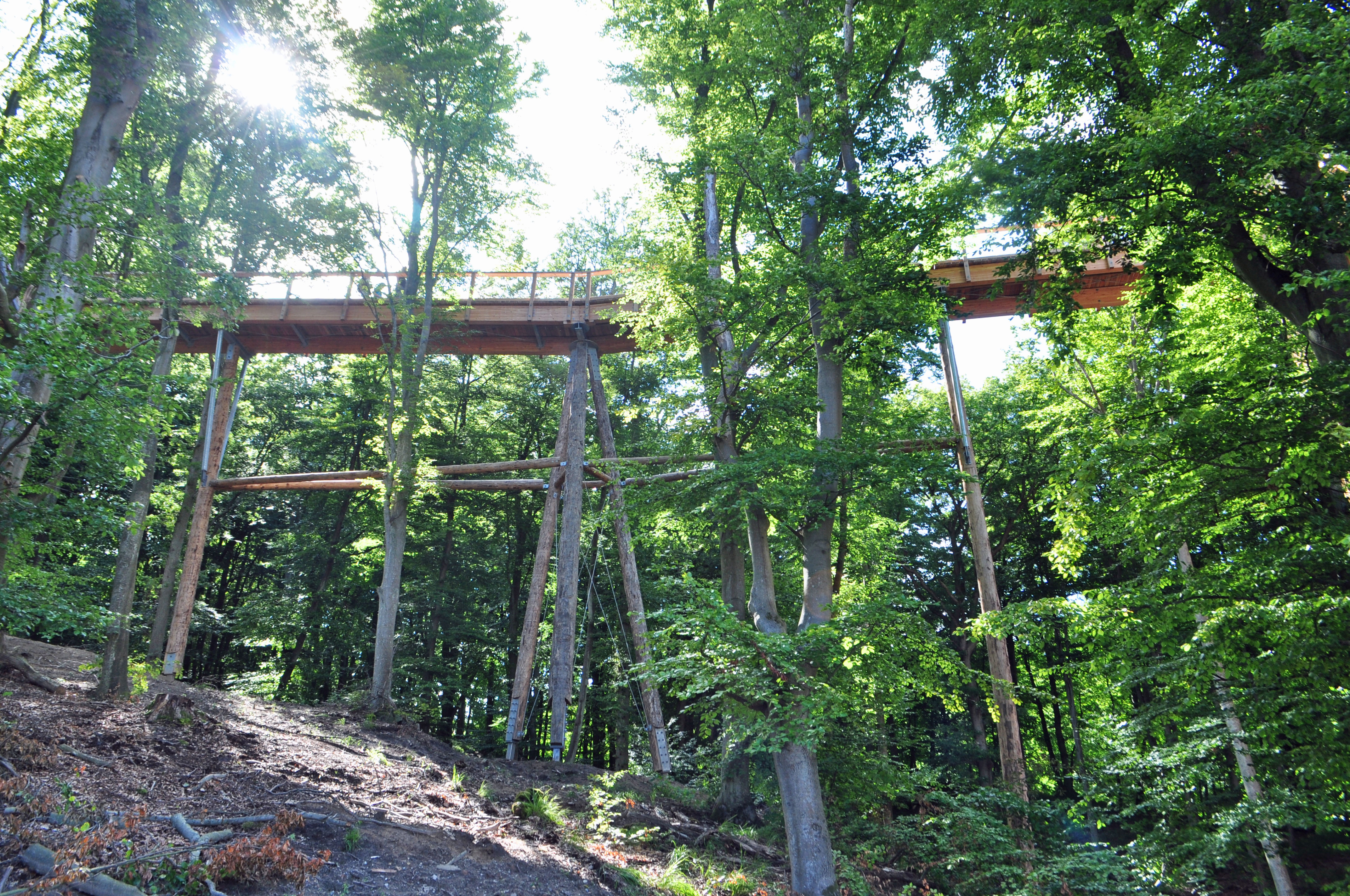 Foto aufgenommen am 31.7.2013 auf dem Gelände des Naturerbe-Zentrums auf der Insel Rügen, "Baumwipfelpfad".. Beschreibung siehe Dateiname. Pfad durch den Wald, Holz- und Stahlkonstruktion